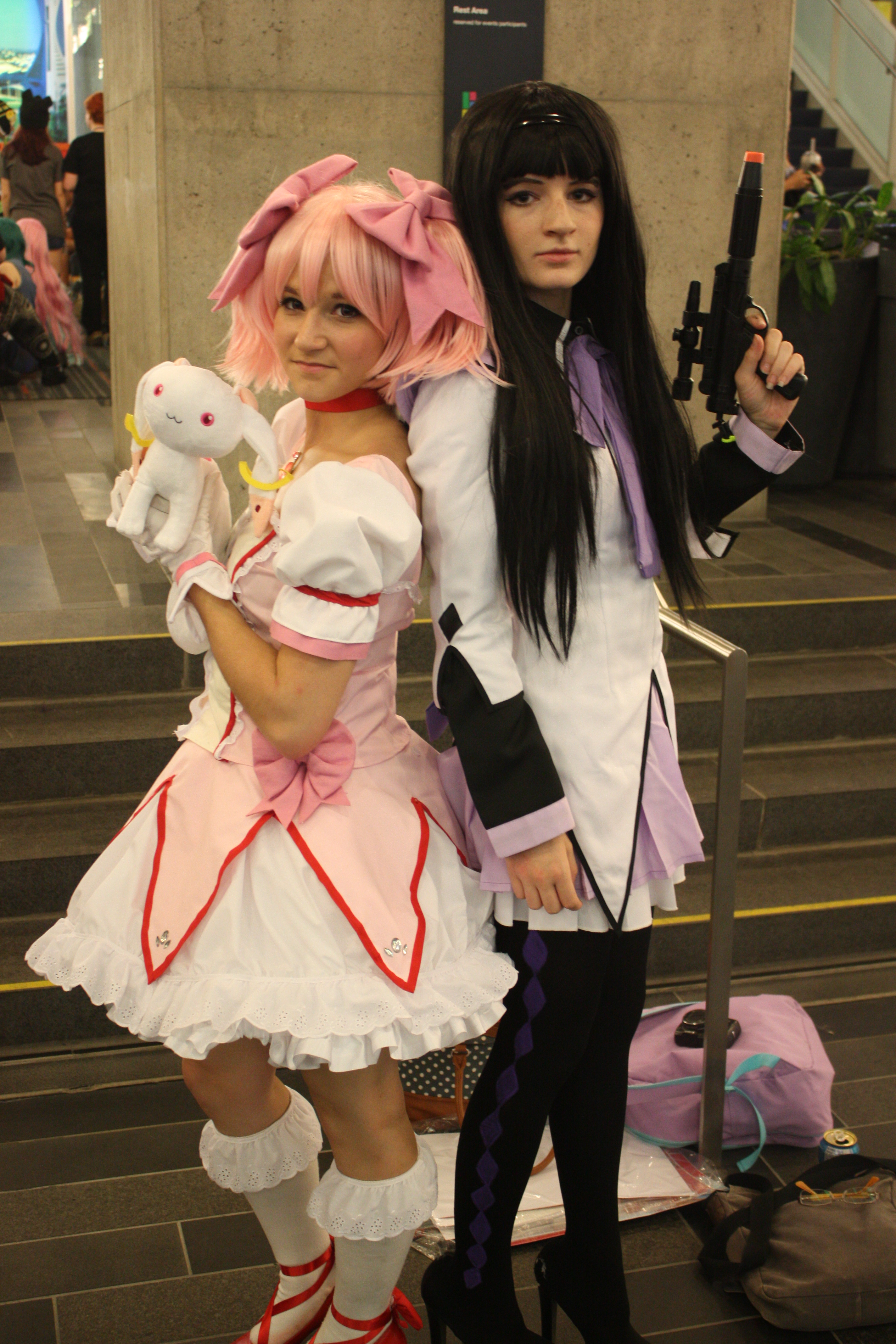 Otakuthon 2014: Madoka Kaname and Homura Akemi